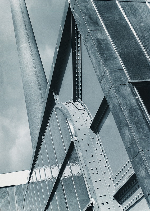 Kolín, elektrárna ESSO (Elektrárenský svaz středolabských okresů). Detail průčelí, fotografie 18x24 cm.